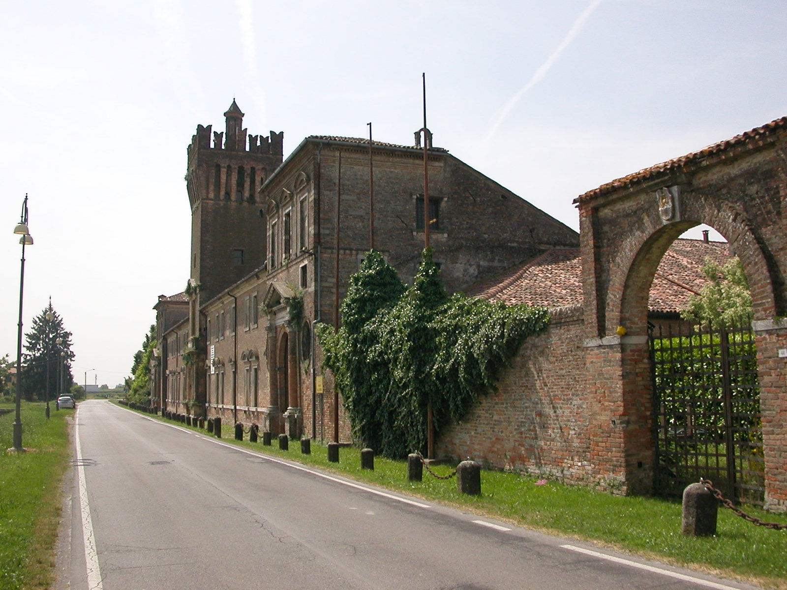 Il castello di San Pelagio, Due Carrare, Provincia di Padova. Sede del Museo dell'Aria e dello Spazio